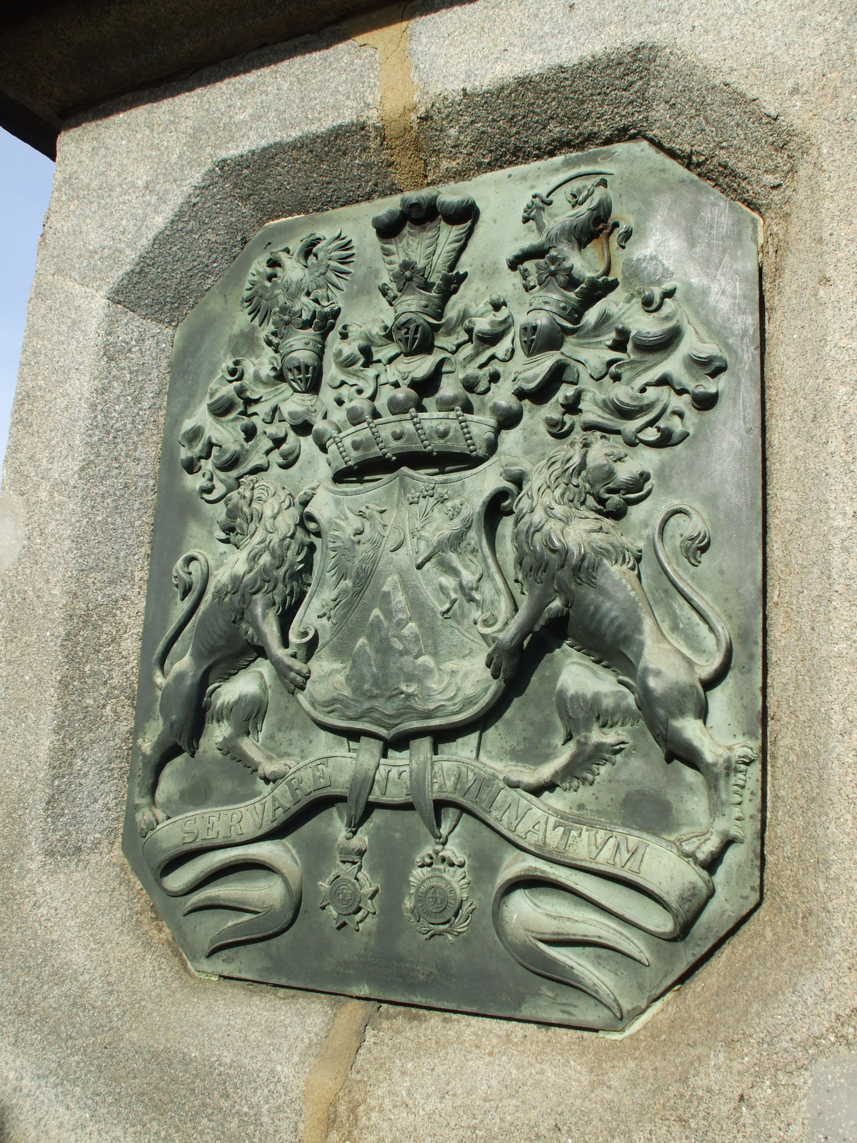 Lánchíd (Budapest, Lánchíd, Sina család címere [1], alul szalagon a családi jelszó: „servare intaminatum” olvasható) This is a photo of a monument in Hungary, Identifier: 17